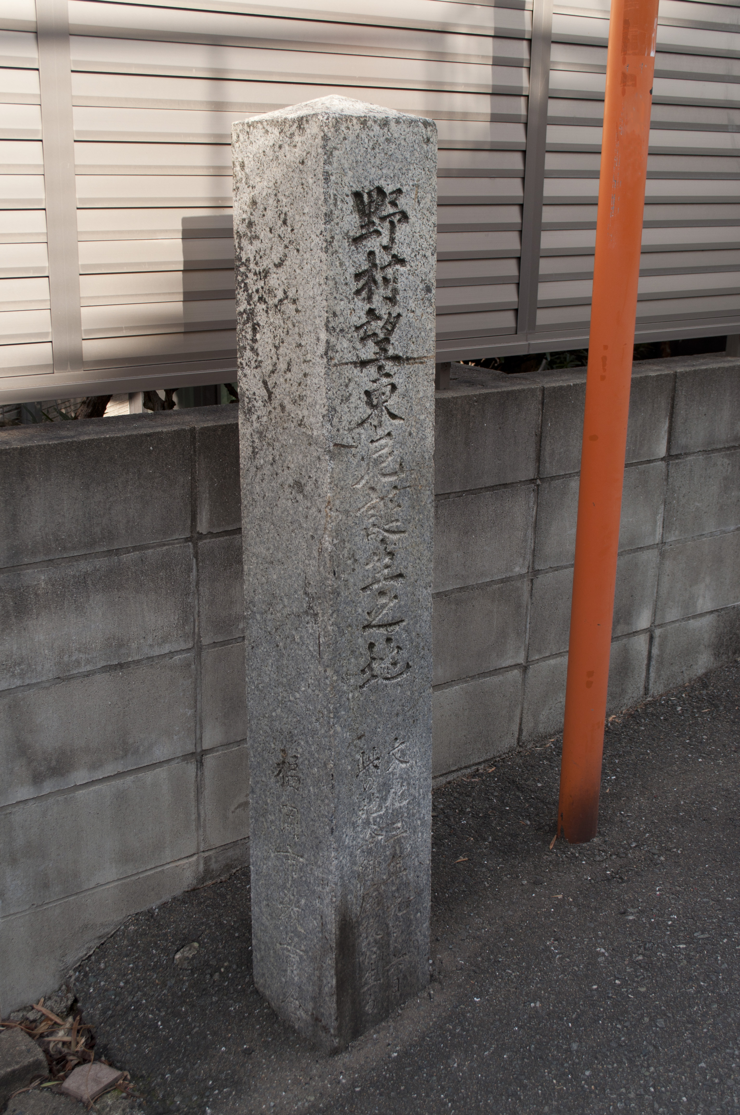 福岡県福岡市中央区赤坂3丁目にある野村望東尼誕生之地の碑